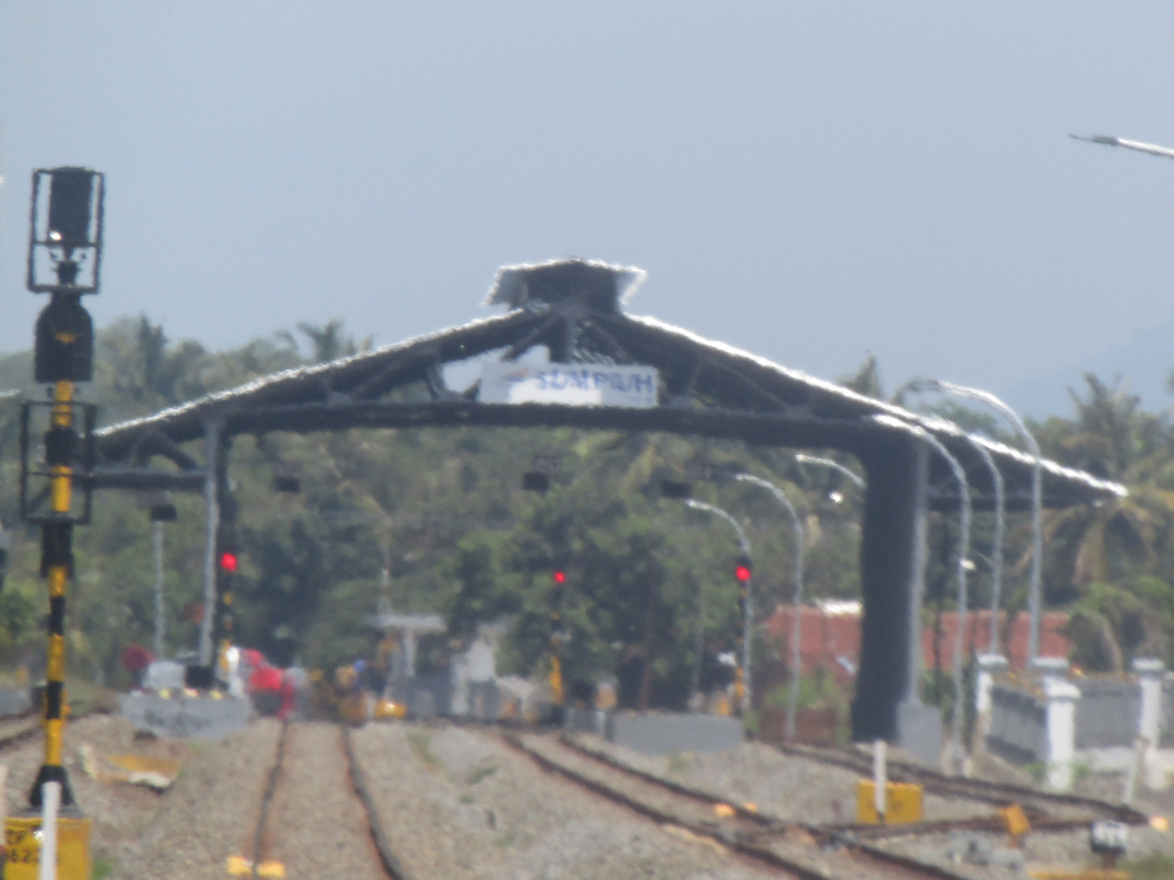 Emplasemen Stasiun Sumpiuh, 2020